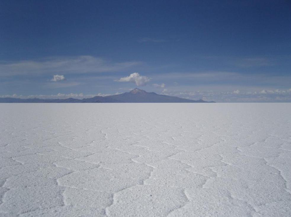 Volcan Thunupa, Salar de Uyuni. Potosí - Bolivia